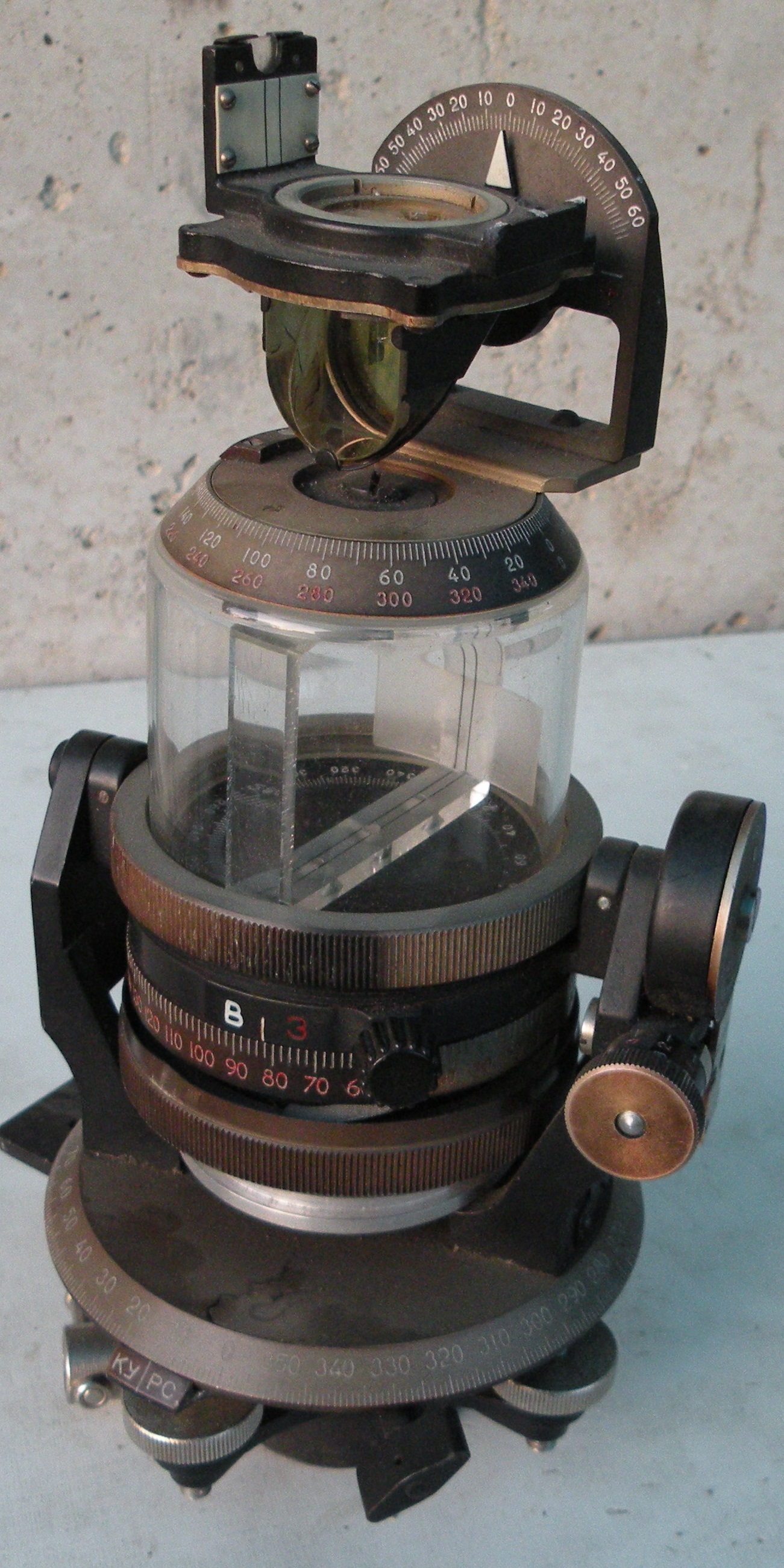 Секстант